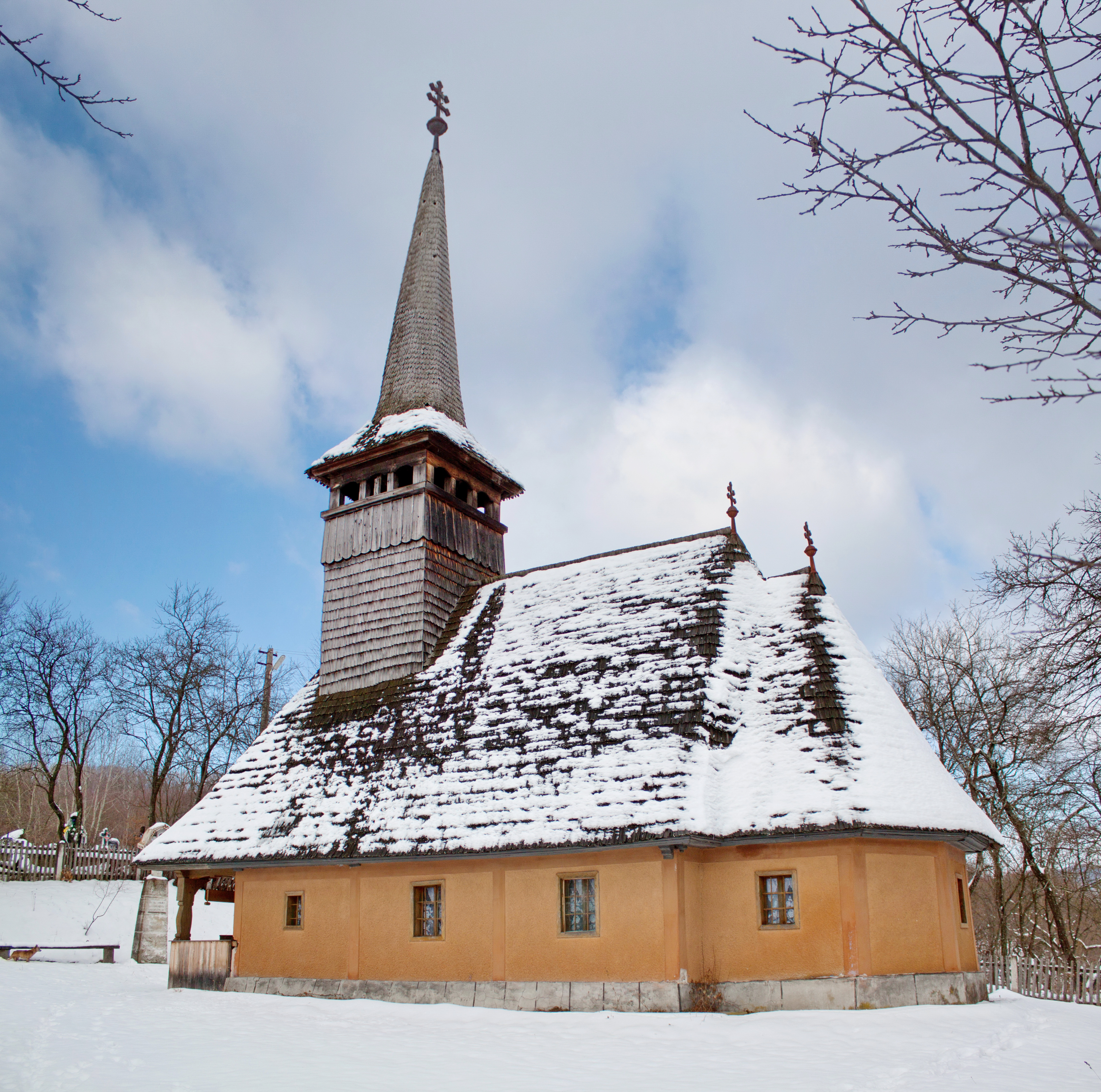 Biserica de lemn din Valea Loznei, județul Sălaj.